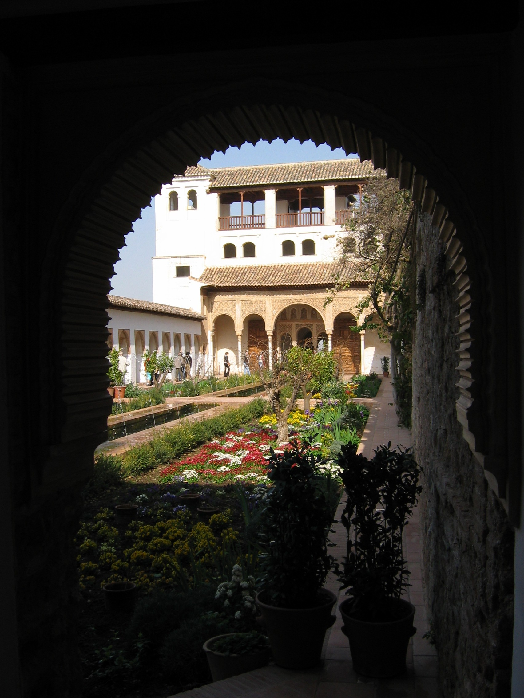 Gardens of the Generalife Palace, Alhambra, in spring. Les jardins du Palais du Generalife, Alhambra, en printemps.